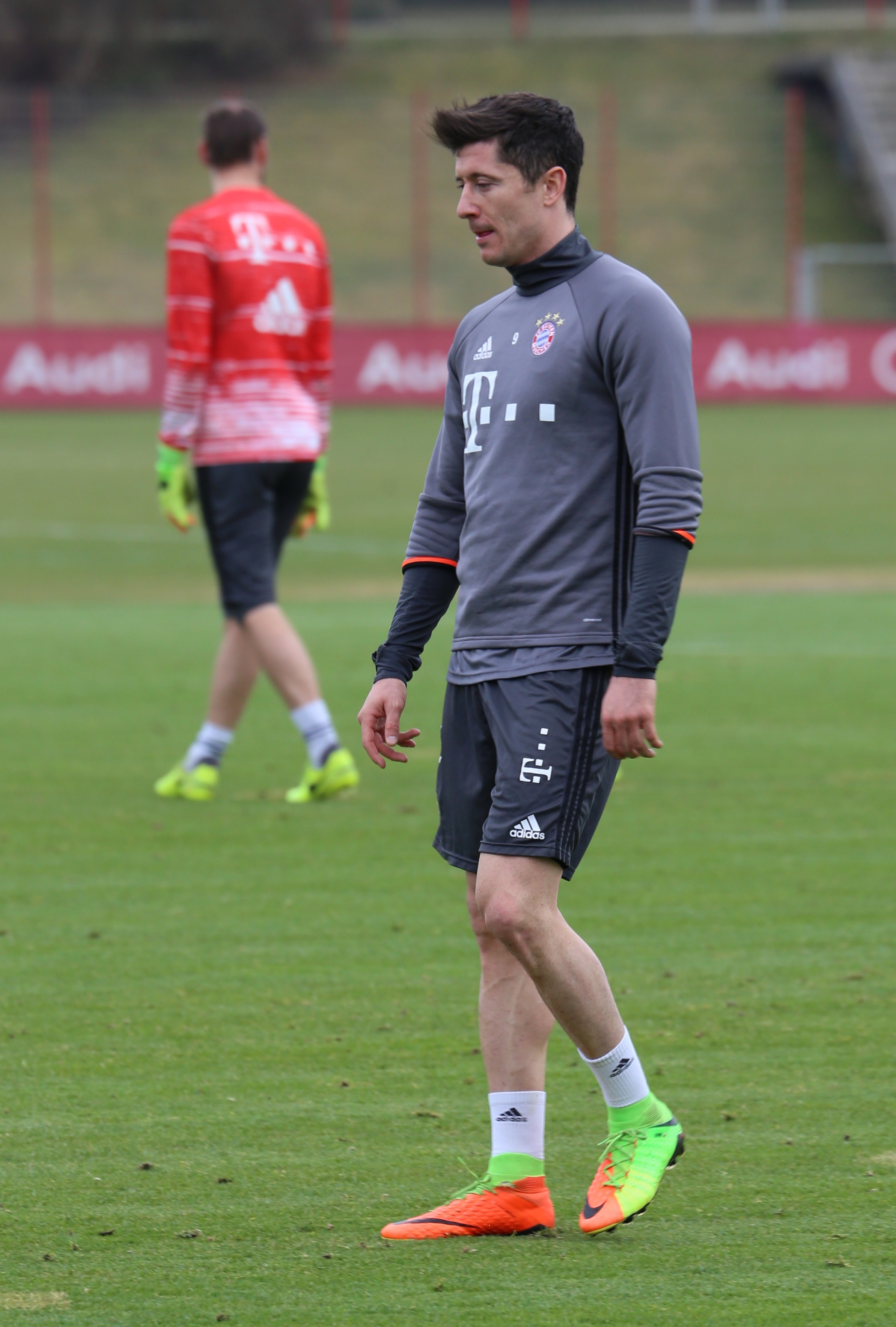 Robert Lewandowski am 14. März 2017 beim Training auf dem Gelände des FC Bayern München